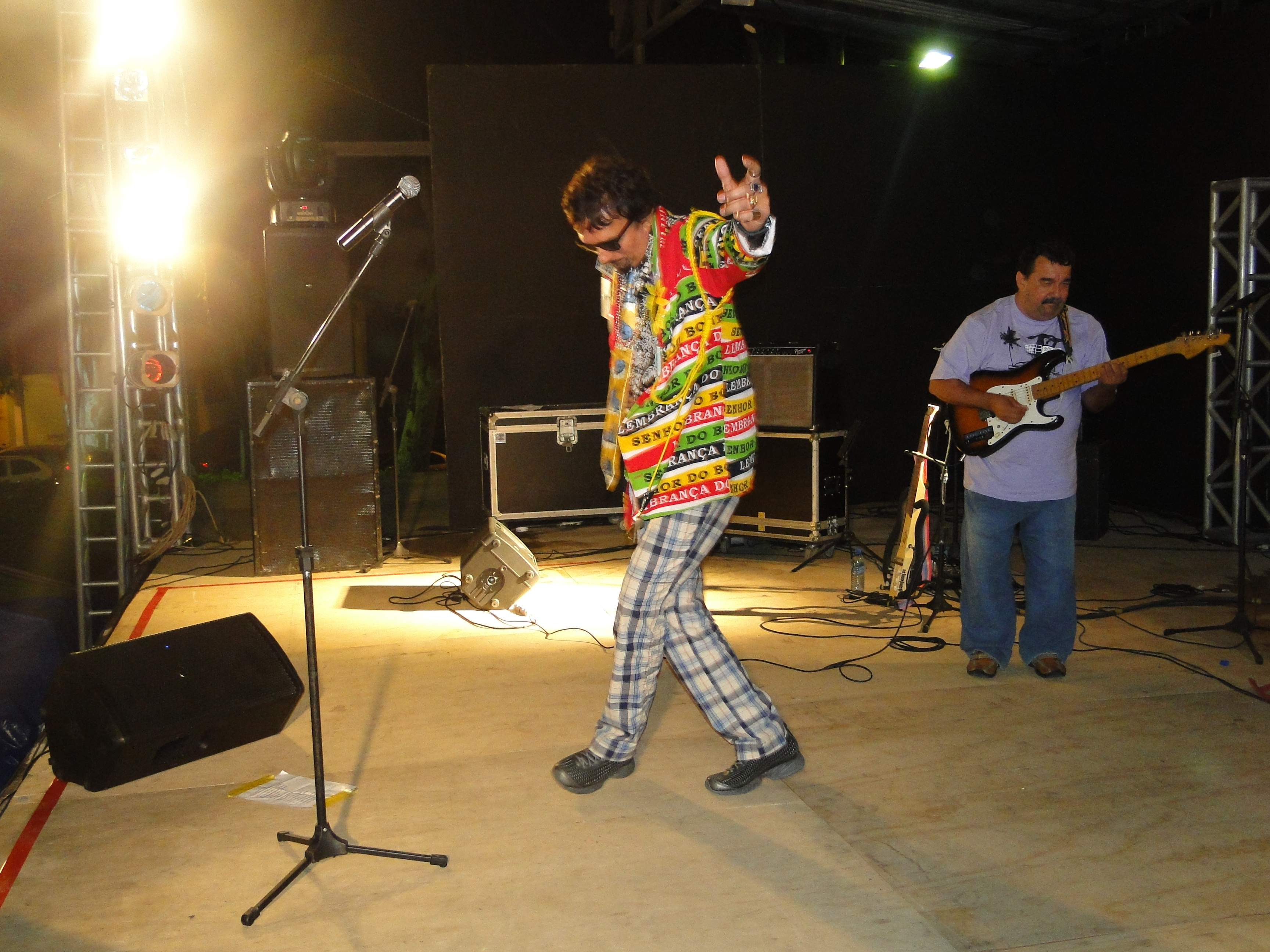 Cantor Falcão e sua irreverência no palco. Show em Tianguá, CE. (24/7/2011)